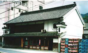 現在の三芳菊酒造外観「馬宮家の武家屋敷一部」